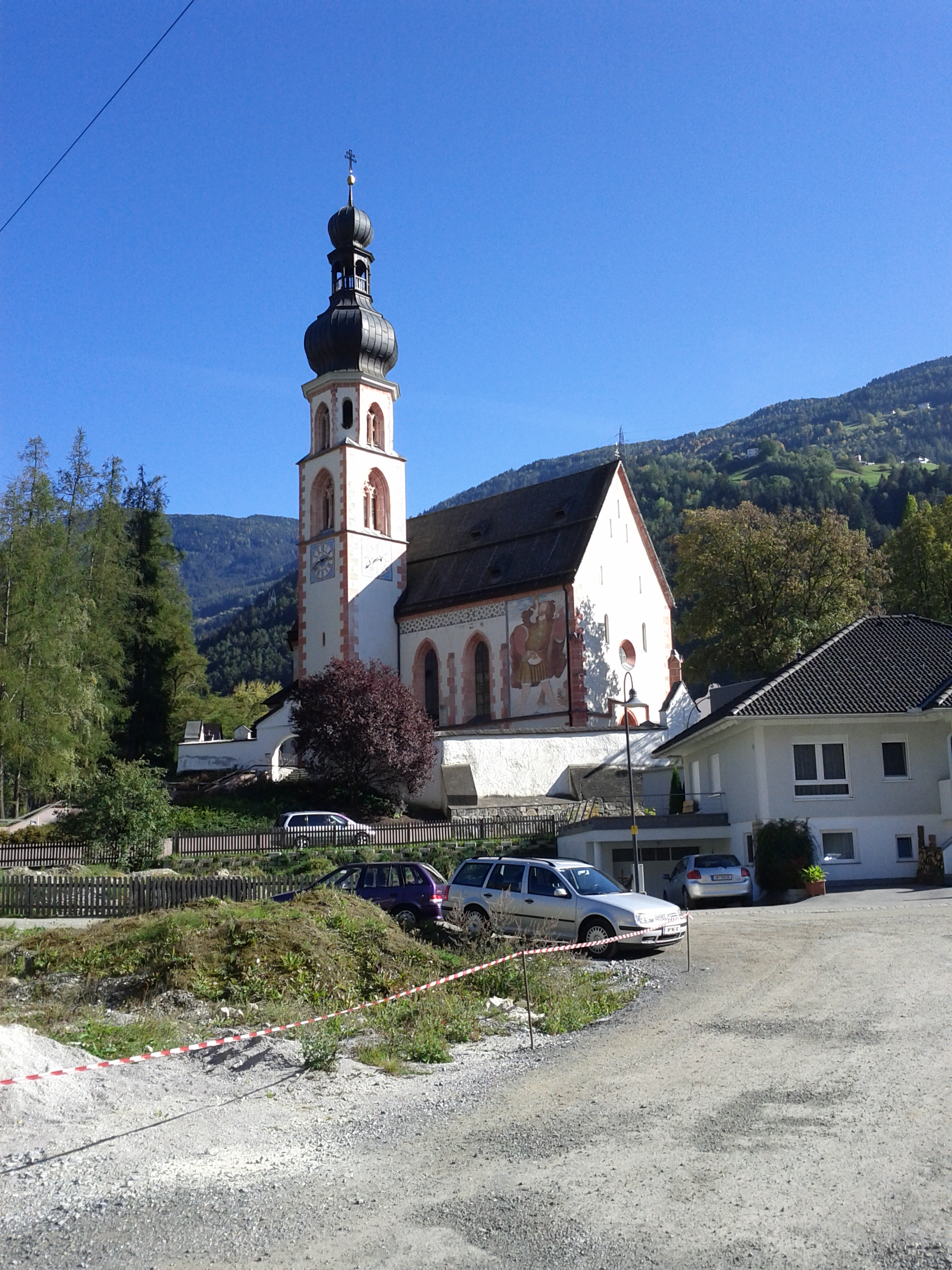 Haiming Kirche